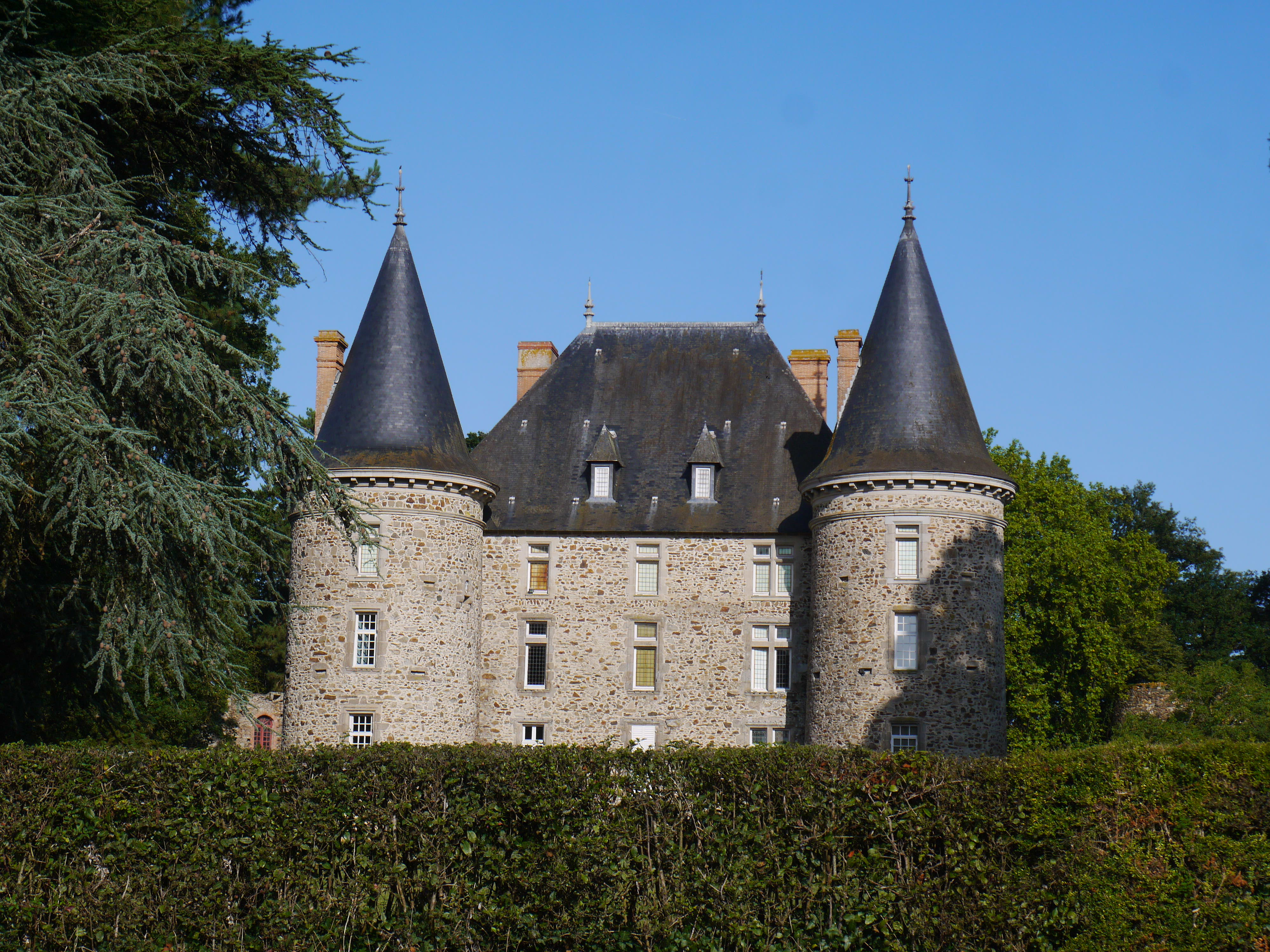 Le château de Somloire depuis la RD 167.